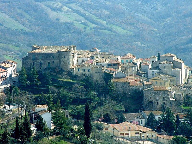 Panorama di Zungoli in provincia di Avellino in Campania